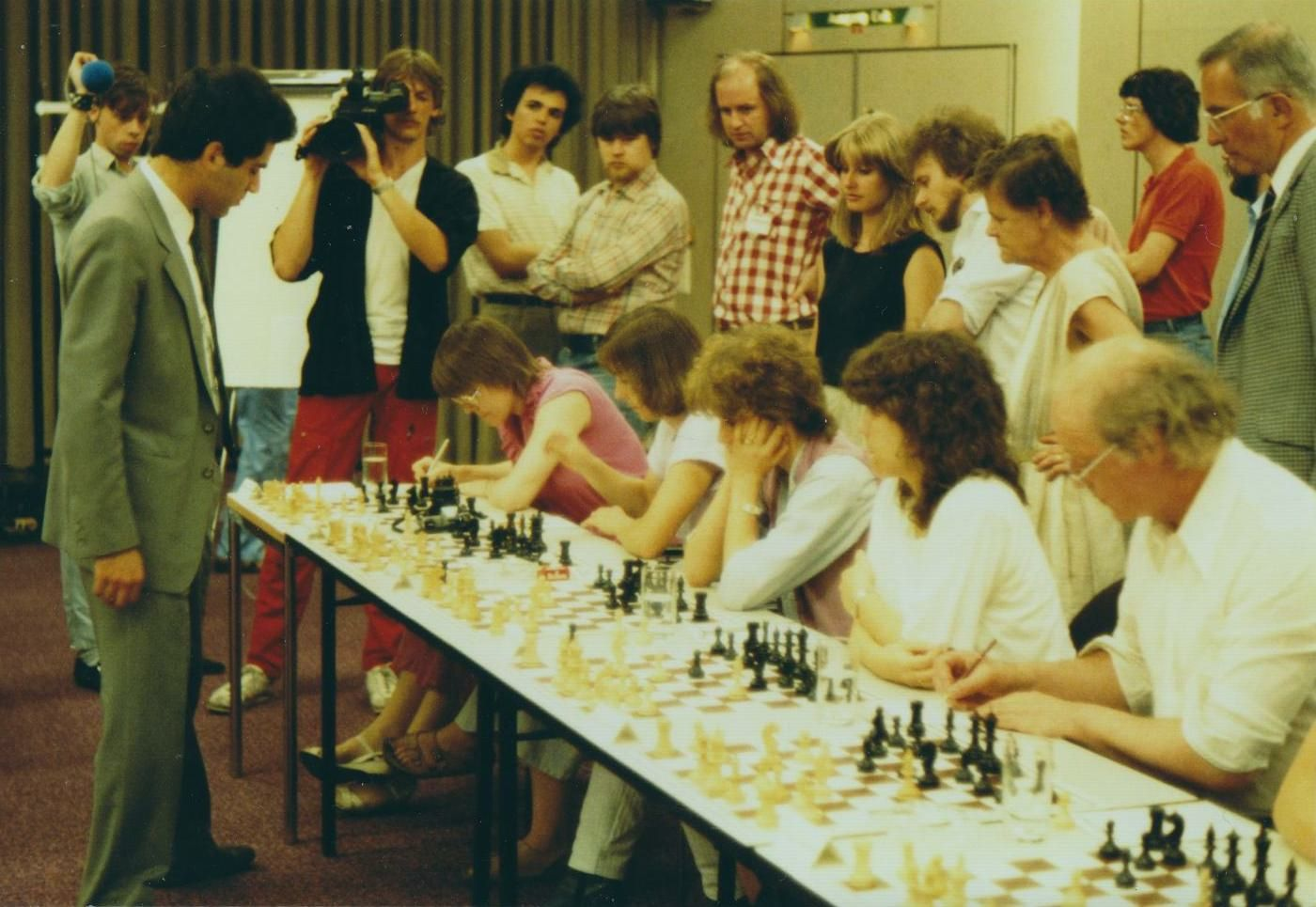 Garry Kasparov, die vier Schwestern Susanne, Barbara, Isabel und Dorothee Hund, sowie Ulrich Wildgruber 1985 in Hamburg bei einem Simultanspiel des späteren Schachweltmeisters Garry Kasparov, eine Veranstaltung des Nachrichtenmagazins Der Spiegel.